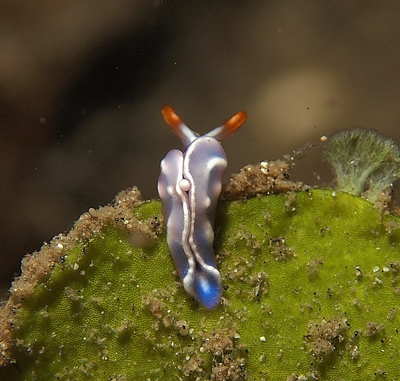 Thuridilla albopustulosa